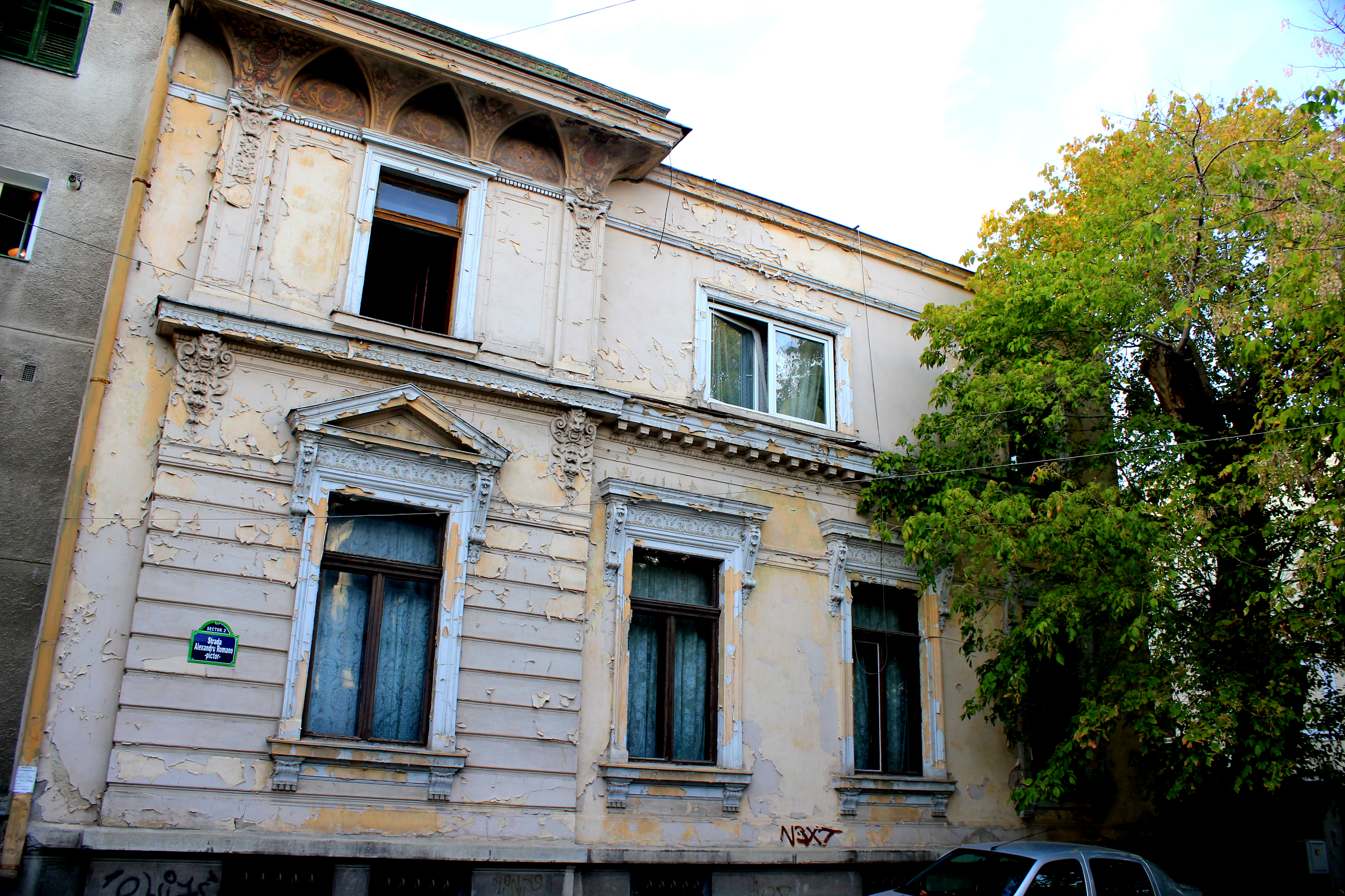 Casa Romano Alexandru 15